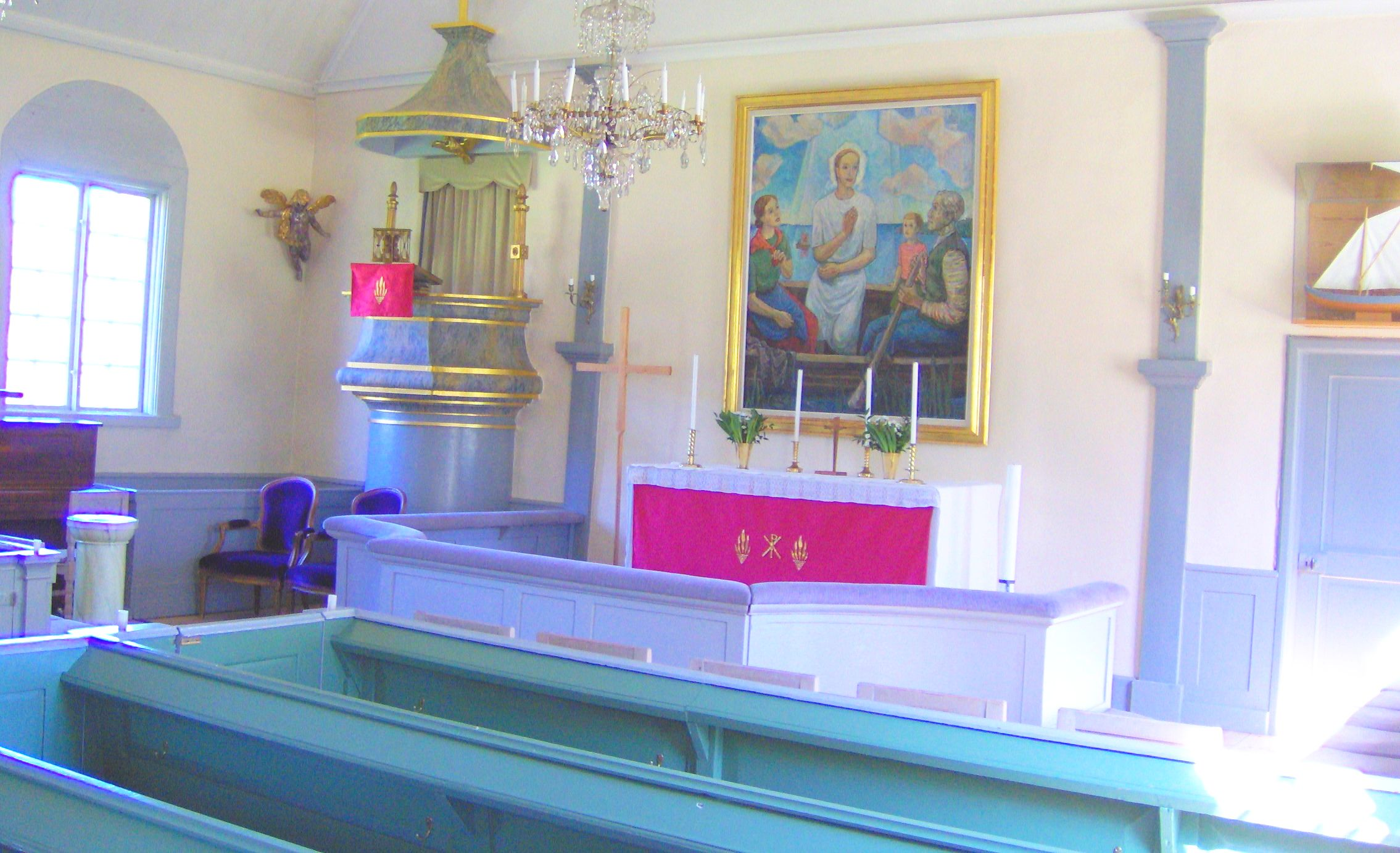 Ingarö kyrka, Ingarö, värmdö kommun, Storstockholm, Stockholms stift.